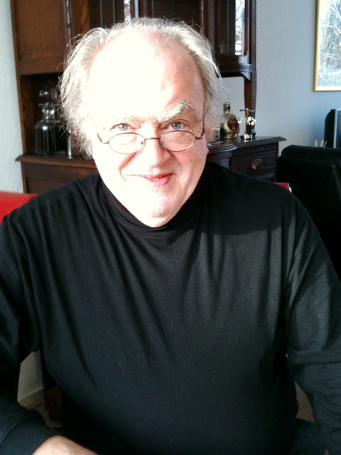 Kees Schoonenbeek (Arnhem, 1 oktober 1947) is een Nederlands componist, muziekpedagoog, organist, dirigent en musicus.